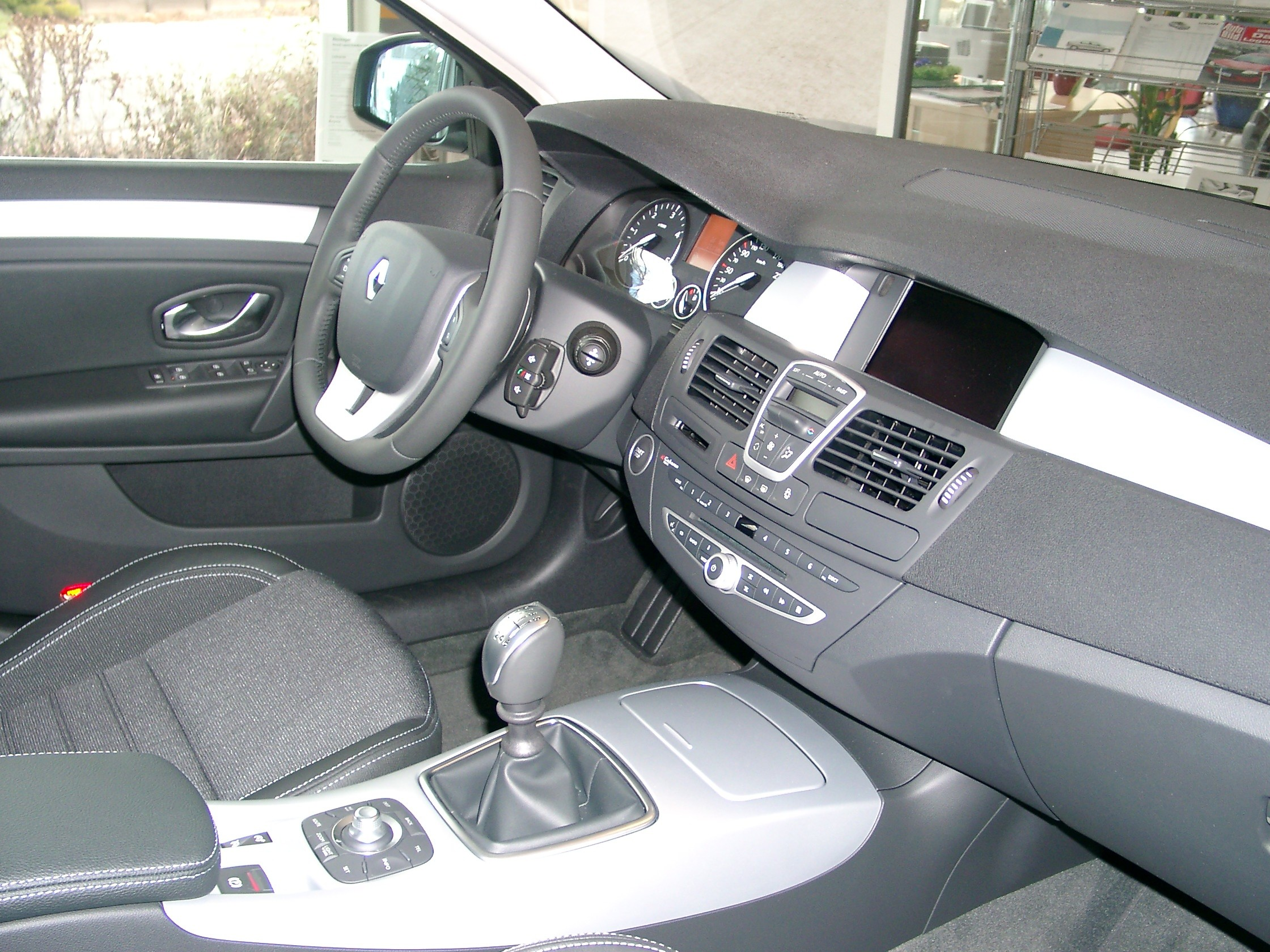 Renault Laguna III, Cockpit